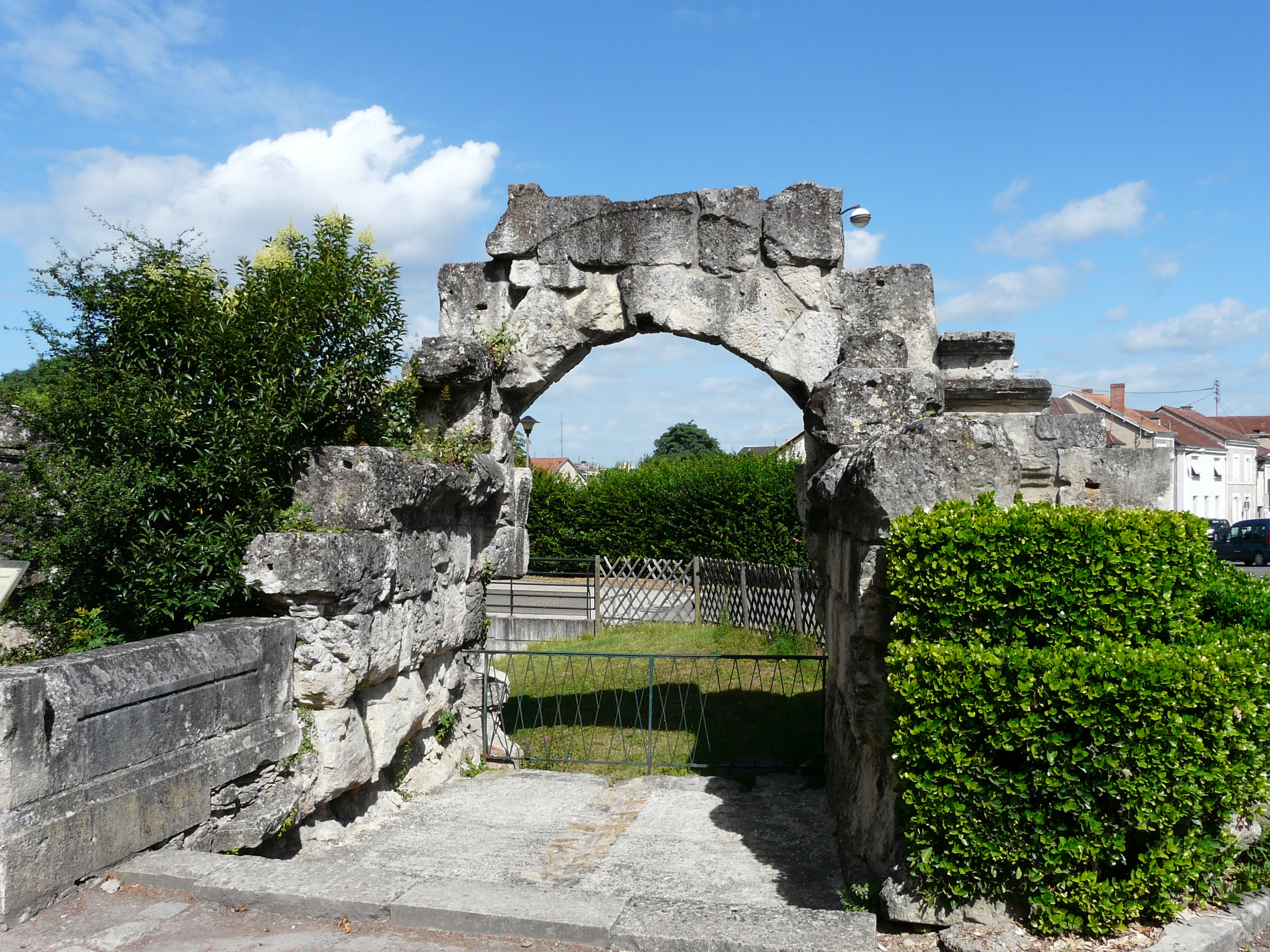 Les vestiges de la porte Normande, Périgueux, Dordogne, France.